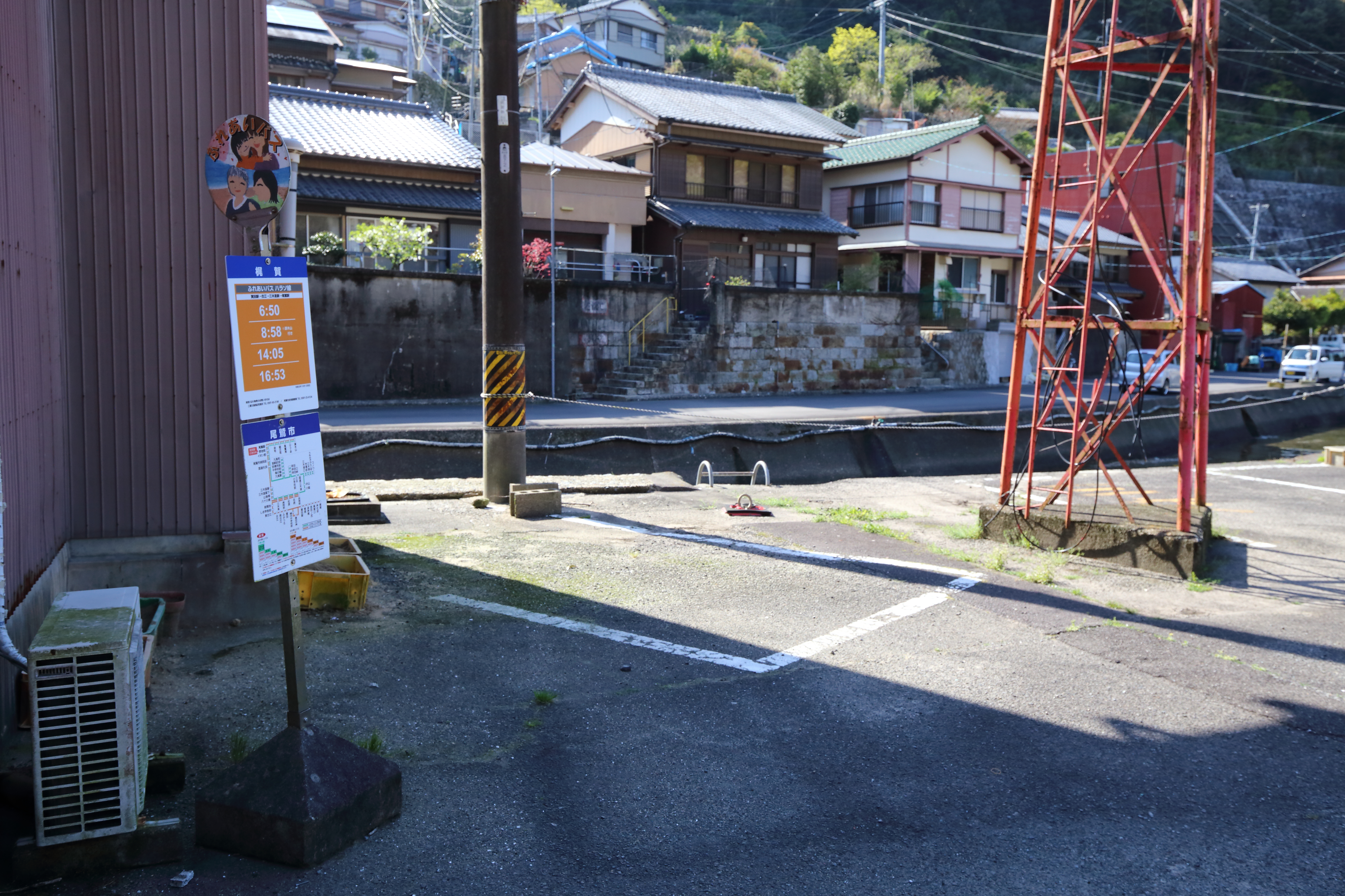 梶賀バス停 ふれあいバス 三重県尾鷲市梶賀町